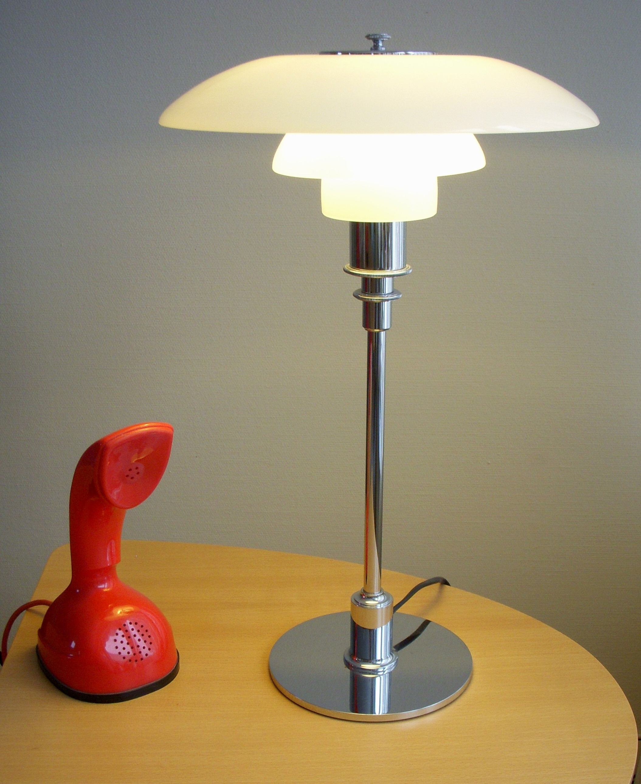 PH-lampa som bordsmodell med glasskärm och Ericssons "Ericofon"